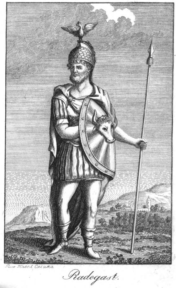 Радегаст, илл. к книге Мифология славянская и российская А.С. Кайсарова.